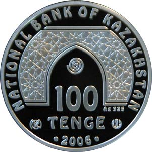 Аверс памятных монет Республик Казахстан серии "Знаменитые мечети мира" 2006 года - 100 тенге - аверс - серебро